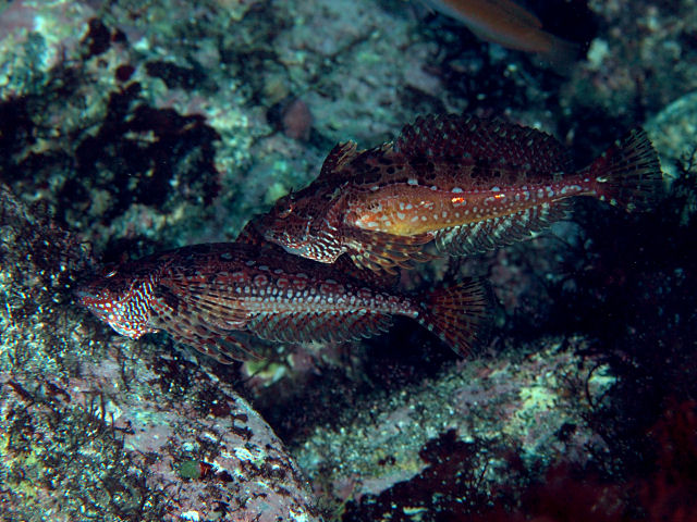 アヤアナハゼ Pseudoblennius marmoratus